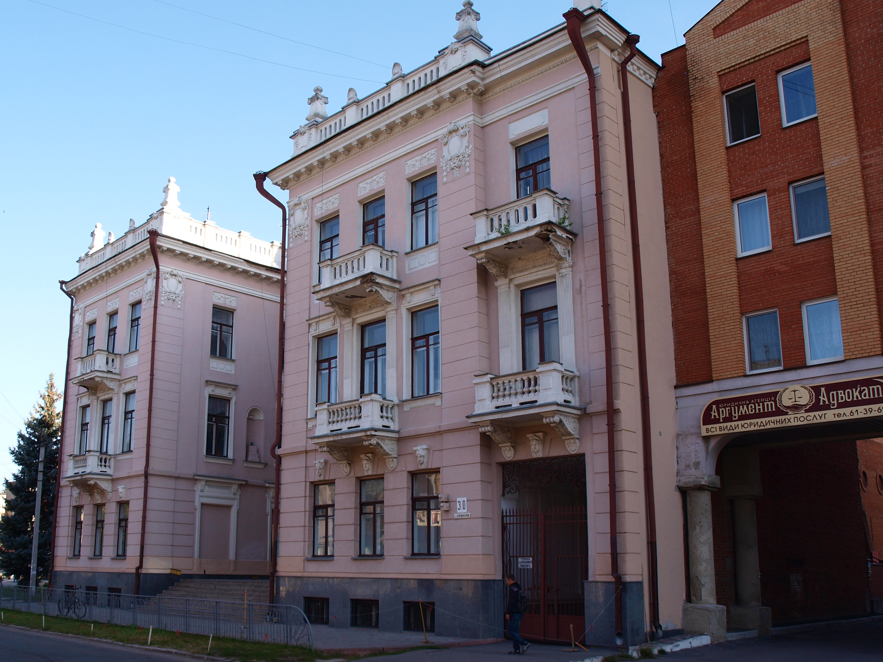 Музичне училище Ахшарумова (ПДЮТ)